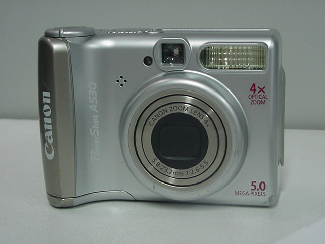 Appareil photographique numérique Canon PowerShot A530